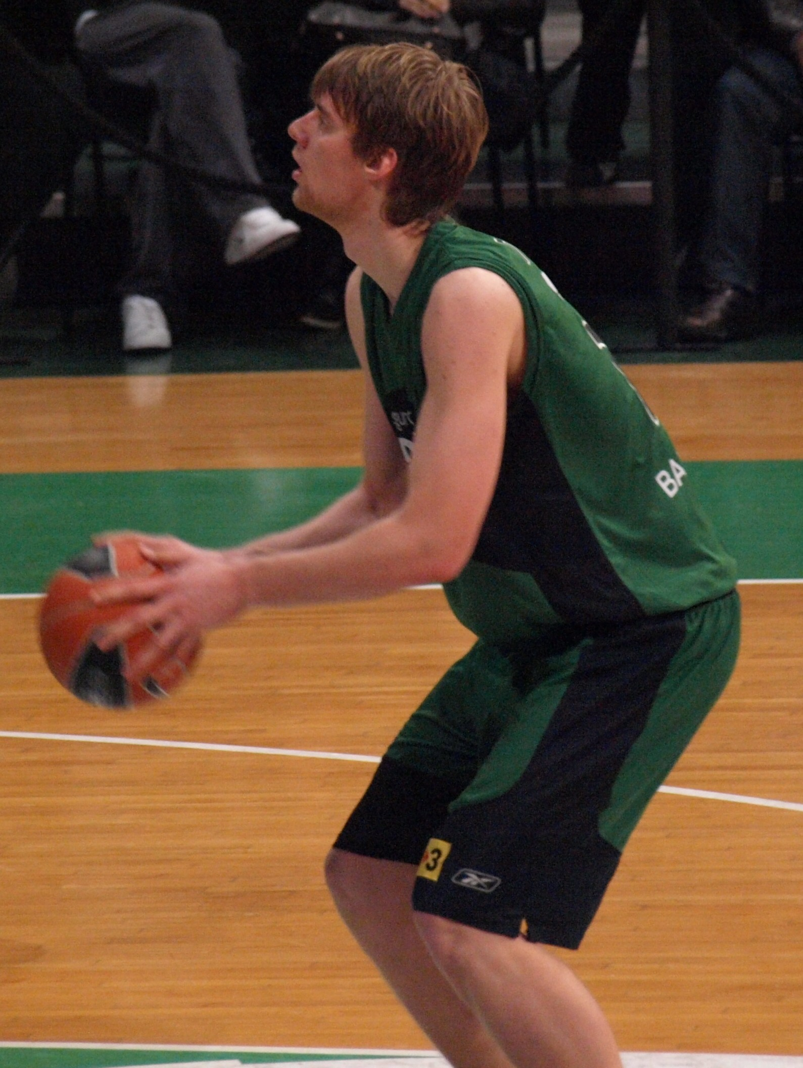 Henk Norel, en el partido que enfrentó al DKV Joventut y al CB Murcia en el Olímpico de Badalona en enero de 2009